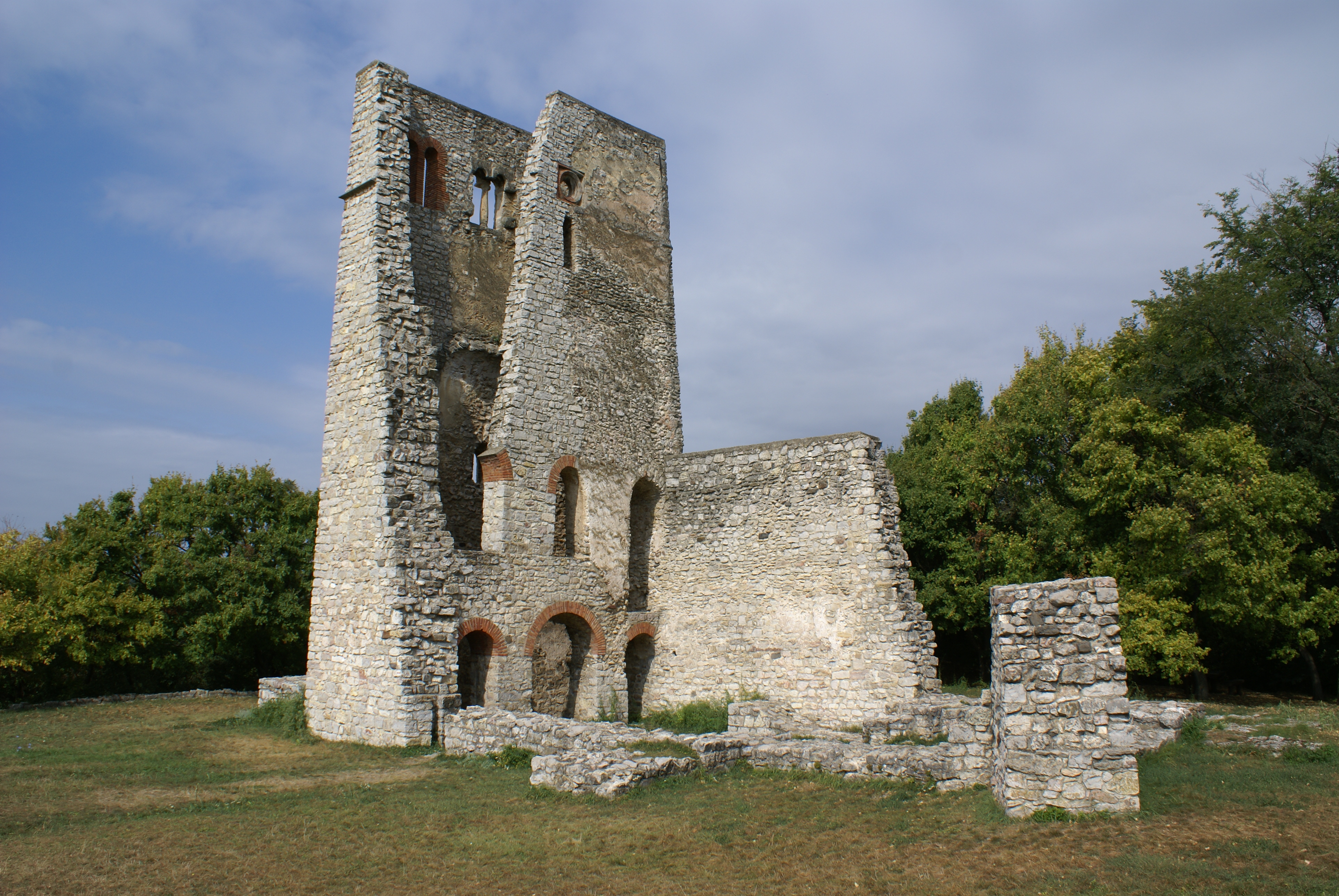 Templomrom (Dörgicse, ALSÓDÖRGICSE) This is a photo of a monument in Hungary, Identifier: 9848